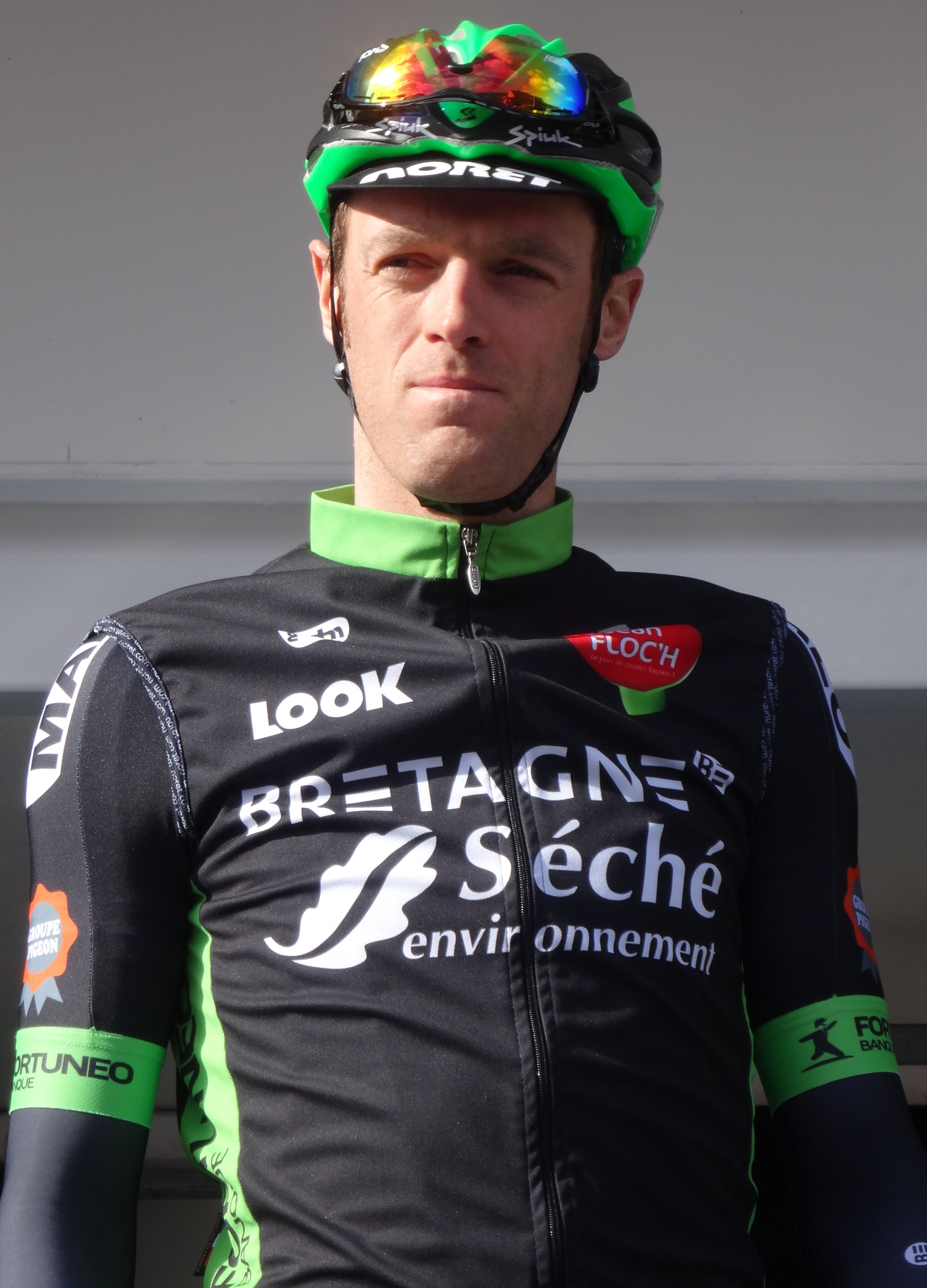 Reportage réalisé le mercredi 4 mars à l'occasion du départ du Samyn des Dames 2015 et du Samyn 2015 à Quaregnon, Belgique.